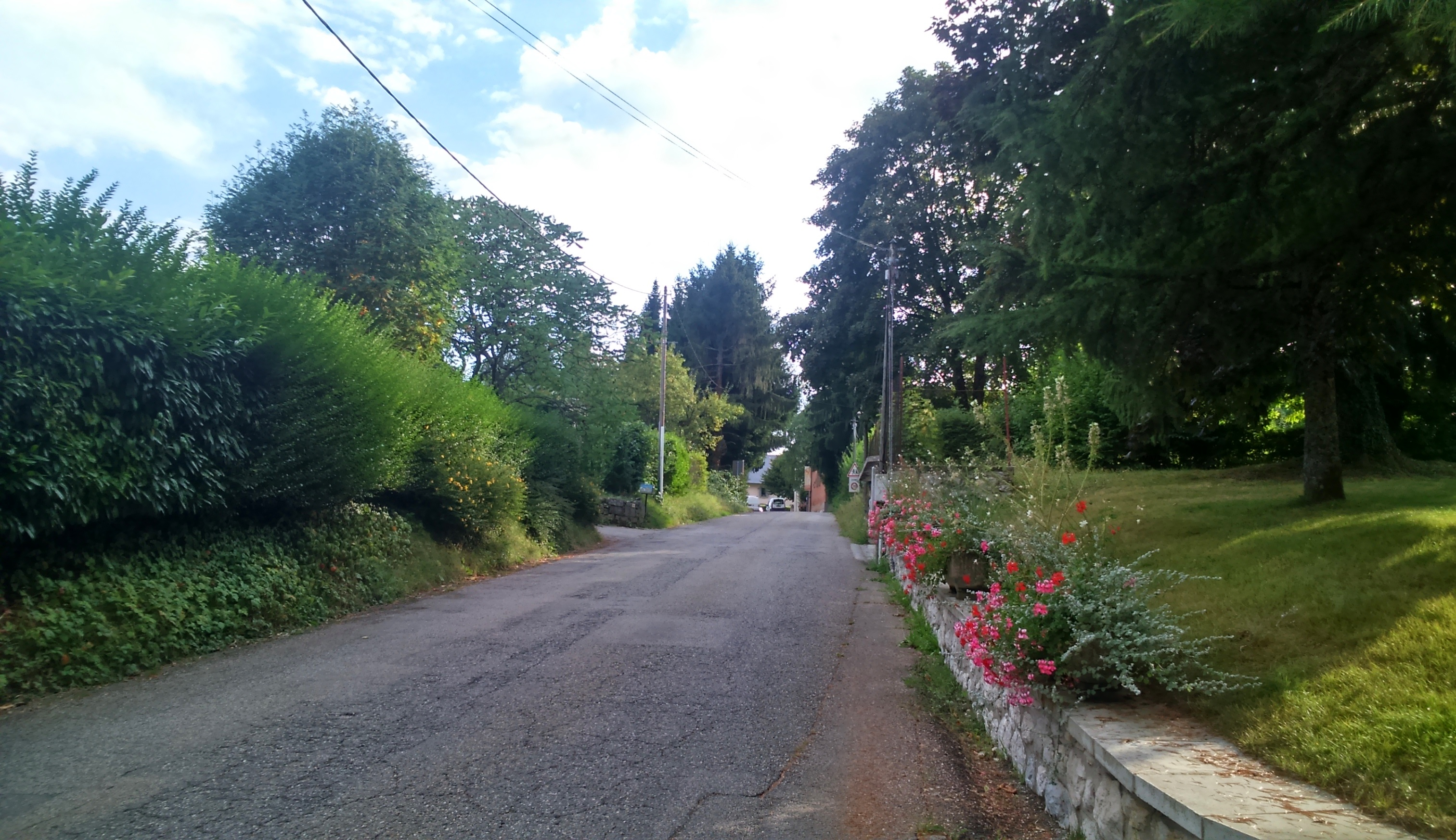 Une rue au centre de Trévignin (Savoie).